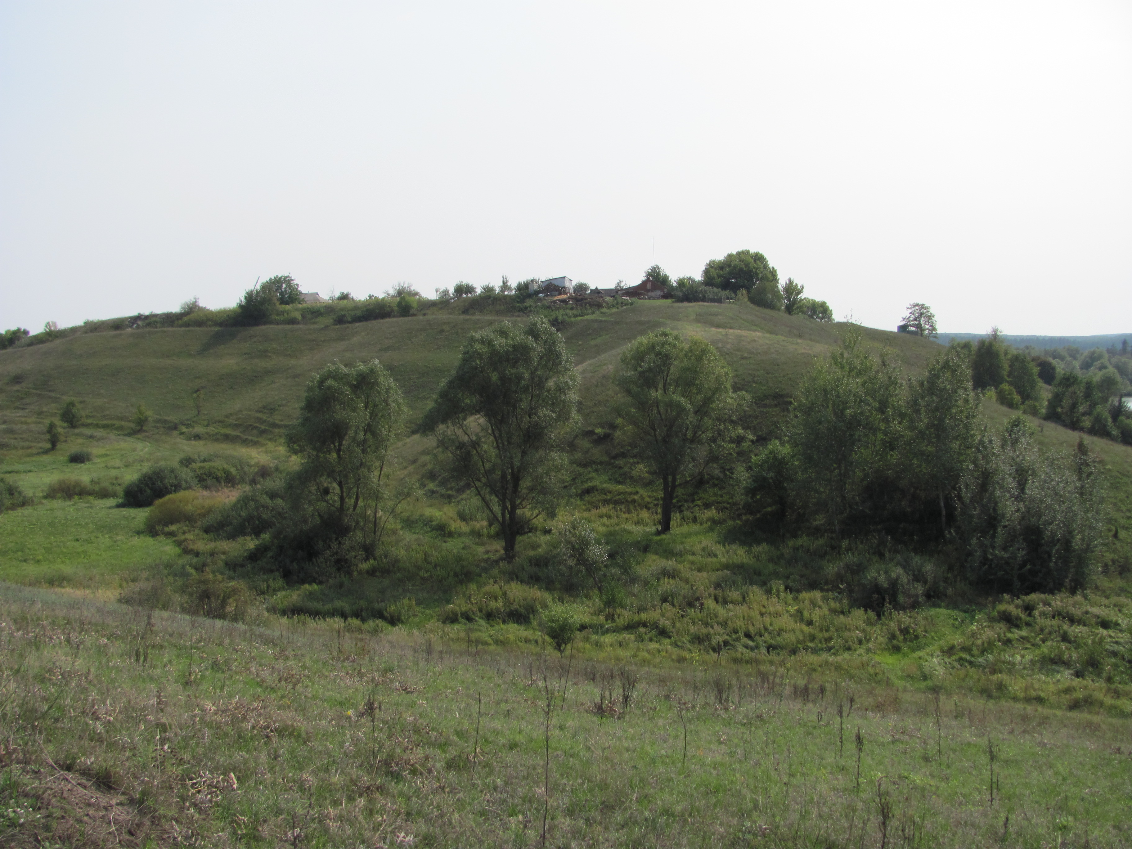 Харківська область, Зміївський район, Великогомільшанська сільська рада, с. Велика Гомільша. Розташоване на лівому березі р. Гомільши (прит. р. Сіверський Донець) частково в межах с. Велика Гомільша, на мисі, утвореному долиною ріки і ярами.